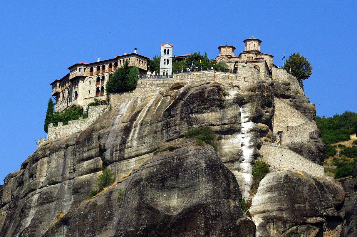 Varlaam-Kloster, Meteora